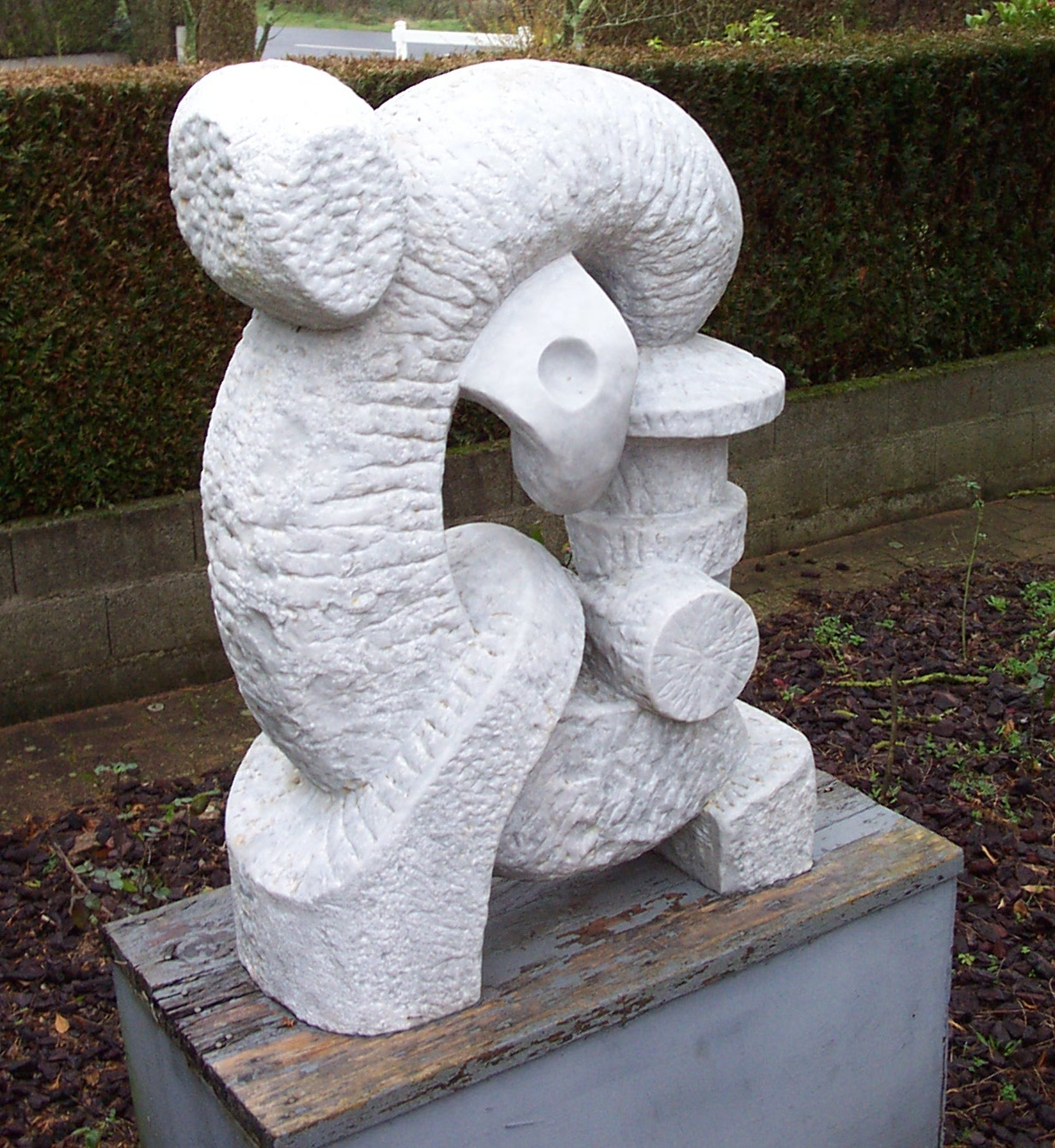 Marbre - Gaétano Di Martino (Photo prise à Clisson en 2002)